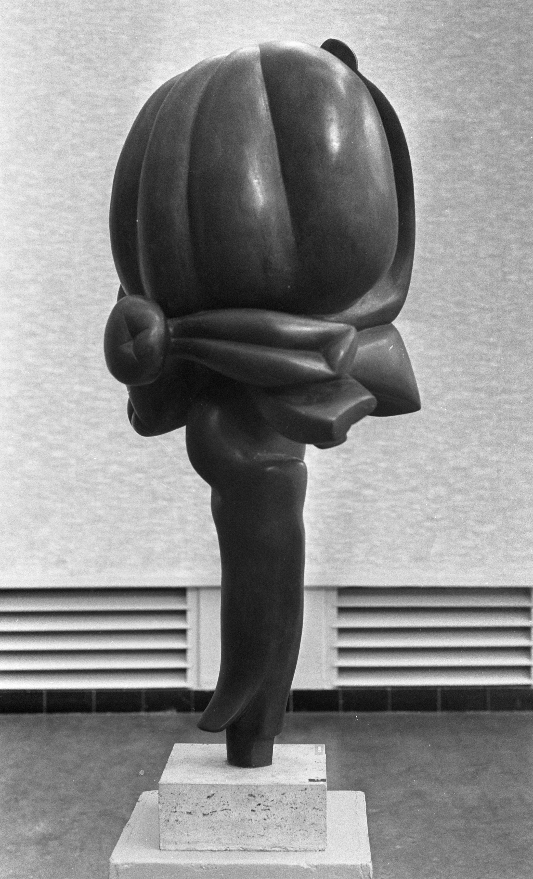 Amerikaanse tentoonstelling in Amsterdam. Bronzen beeld, voorstellende "Floral Bride" van Elbert Weinberg